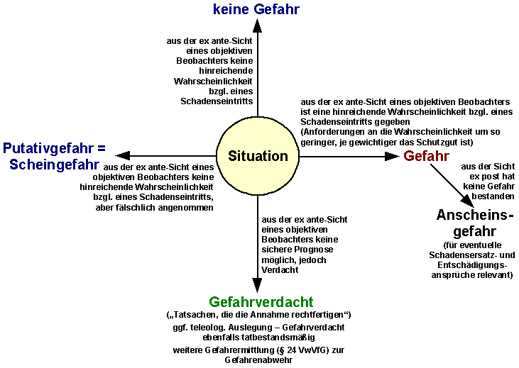 Gefahren im Sinne des Gefahrenabwehrrechts Autor: C.Löser Erstellt mit: de: Draw